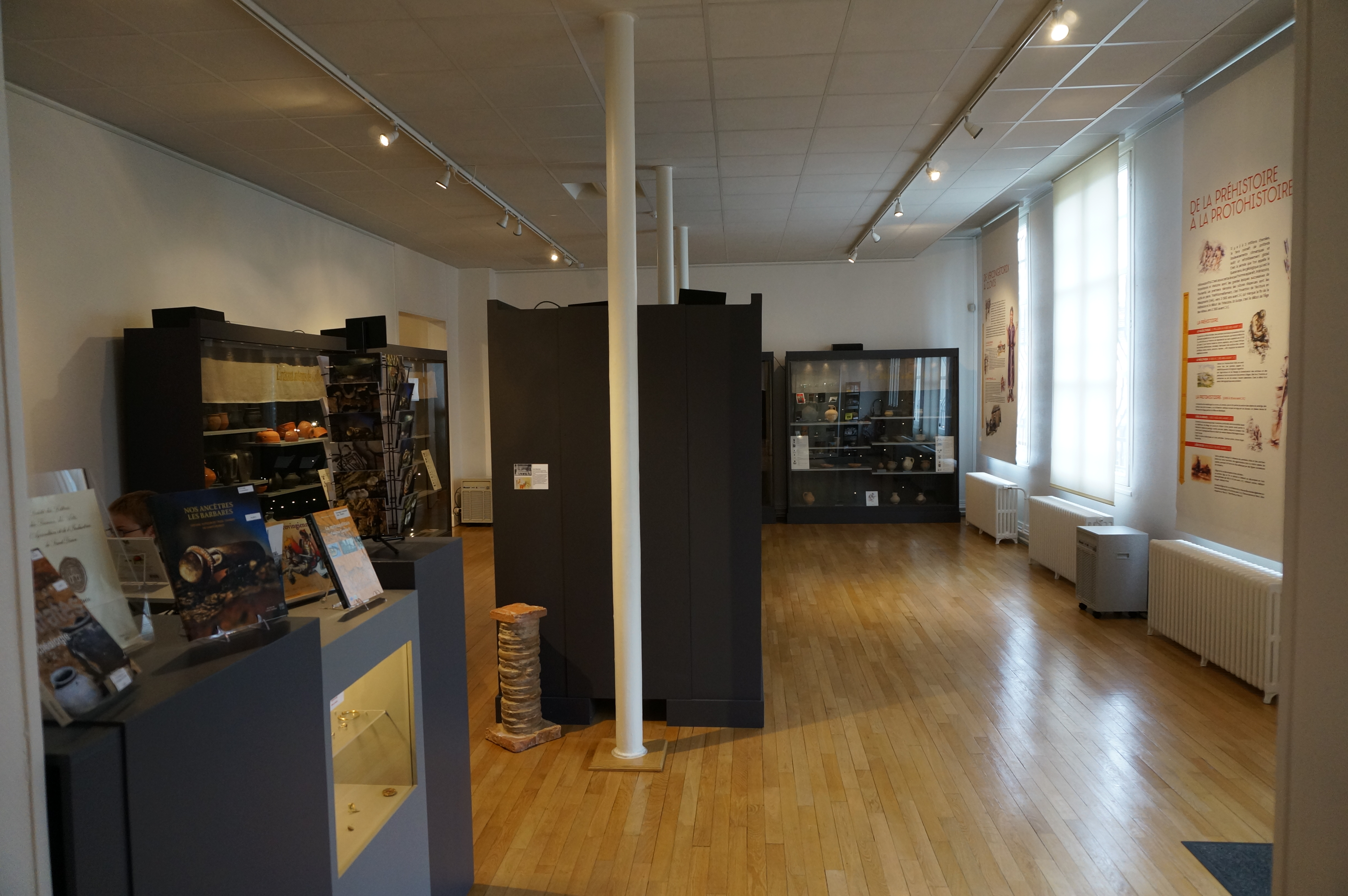 Présenté au musée de st-Dizier .